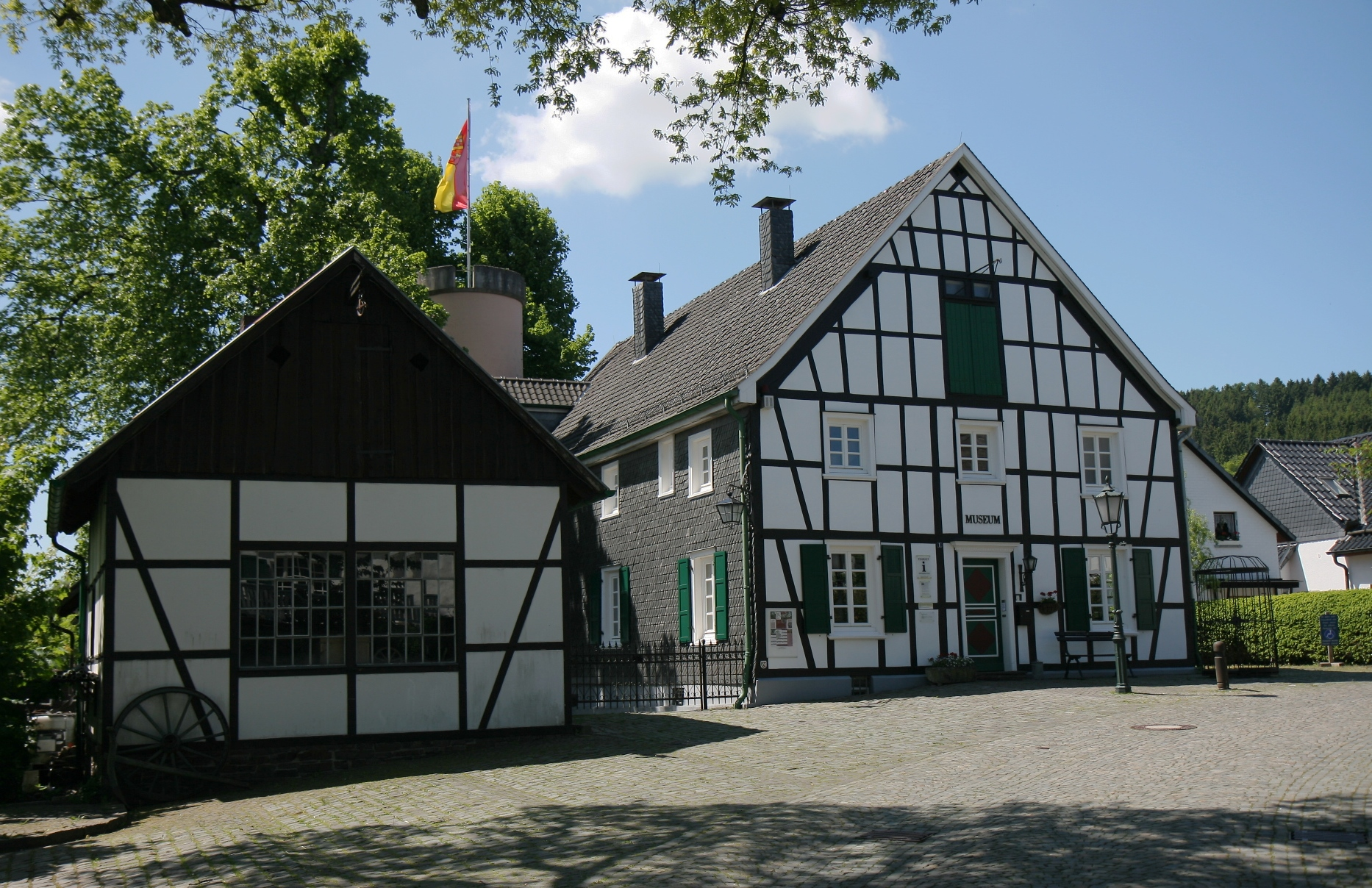 Heimatmuseum in Bergneustadt, Wallstraße 1. This image shows a heritage building in Germany, located in the North Rhine-Westphalian city Bergneustadt.